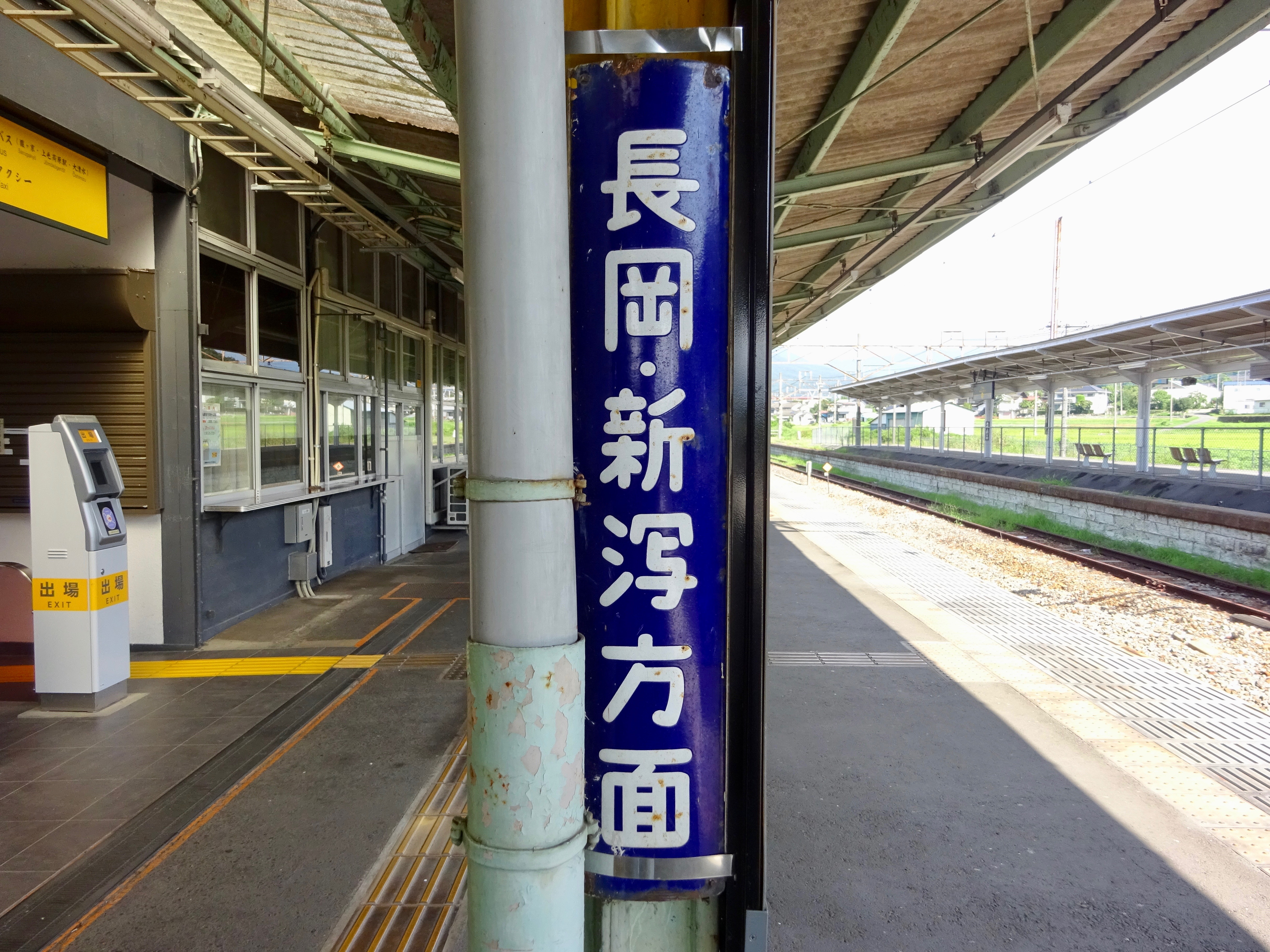 JR上越線後閑駅１番線ホーム